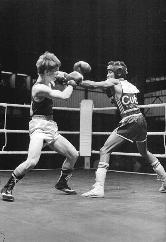 Jochen Födisch, Juan Torres Odelin ADN-ZB Lehmann 26.3.85 Halle: XIV. Internationales Chemie-Pokal-Turnier im Boxen-Mit 5:0 Richterstimmen unterlag im Halbfliegengeewicht (Vorrunde) der 20jährige DDR-Boxer Jochen Födisch (SC Cottbus, l.) dem dreifachen kubanischen Meister Juan Torres Odelin.